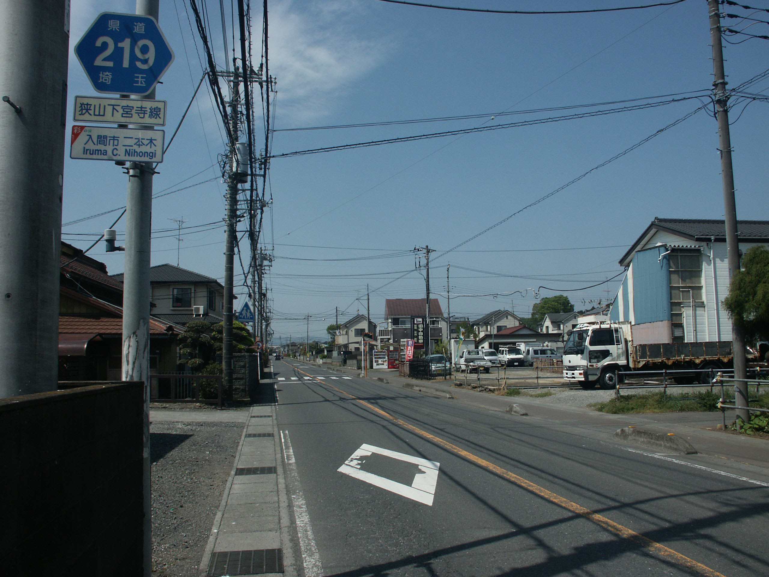 埼玉県道219号線入間市二本木付近（瑞穂町方面を撮影）